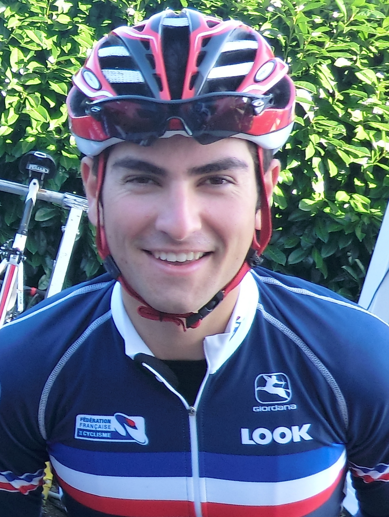 Pierre-Henri Lecuisinier à l'échauffement au matin du prologue du tour de l'Ain 2013, à l'hôtel Lyon-Est à Saint-Maurice-de-Beynost.